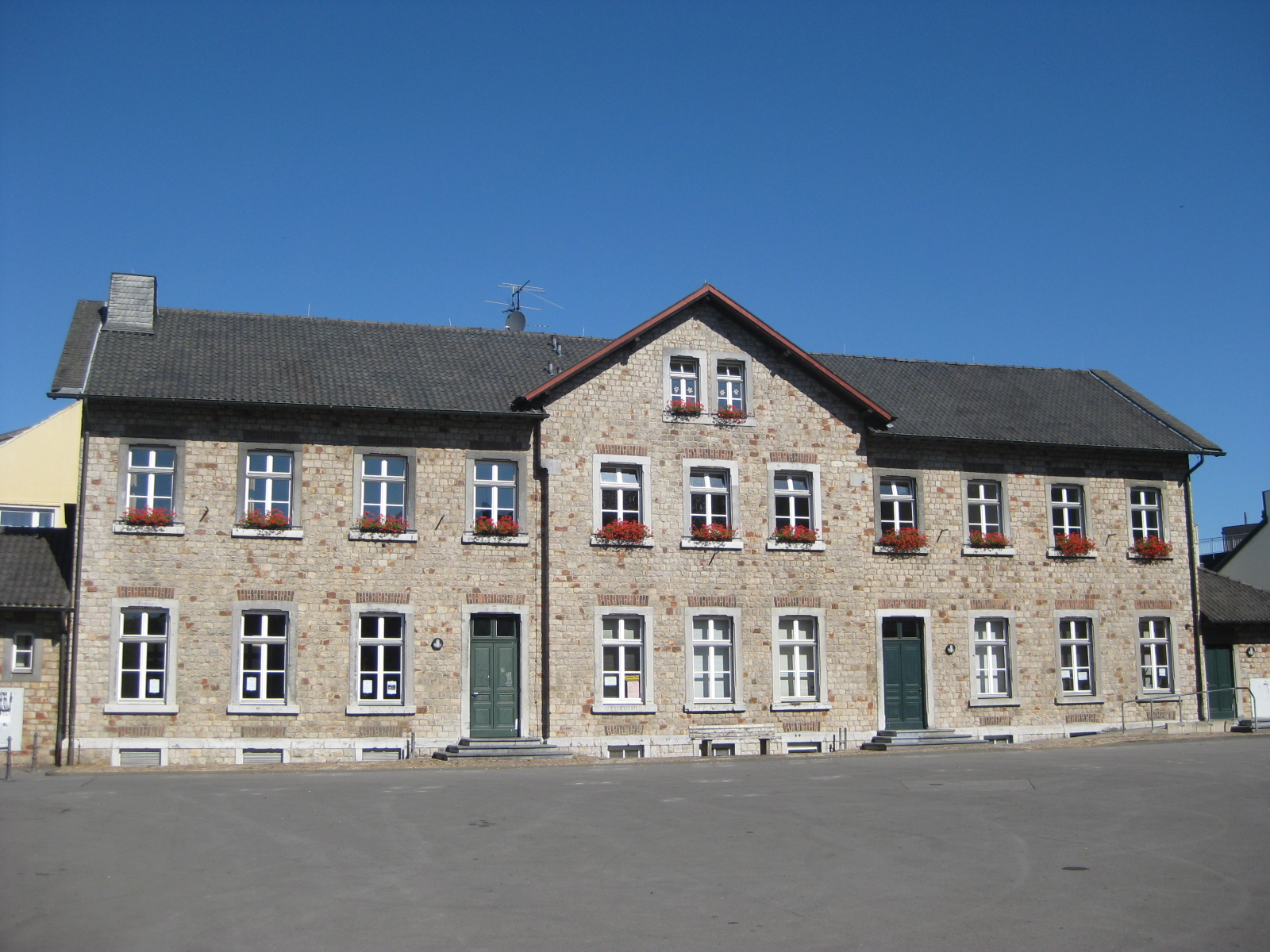 Bürgerhaus im Stolberger Stadtteil Büsbach